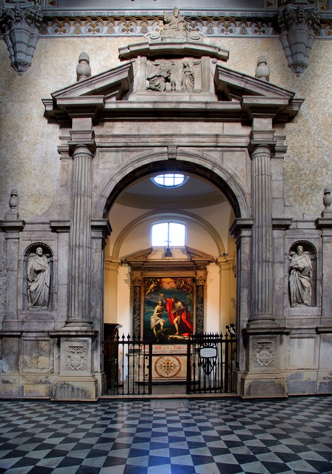 Napoli, ingresso della cappella Brancaccio, progettata da Giovanni Antonio Dosio.